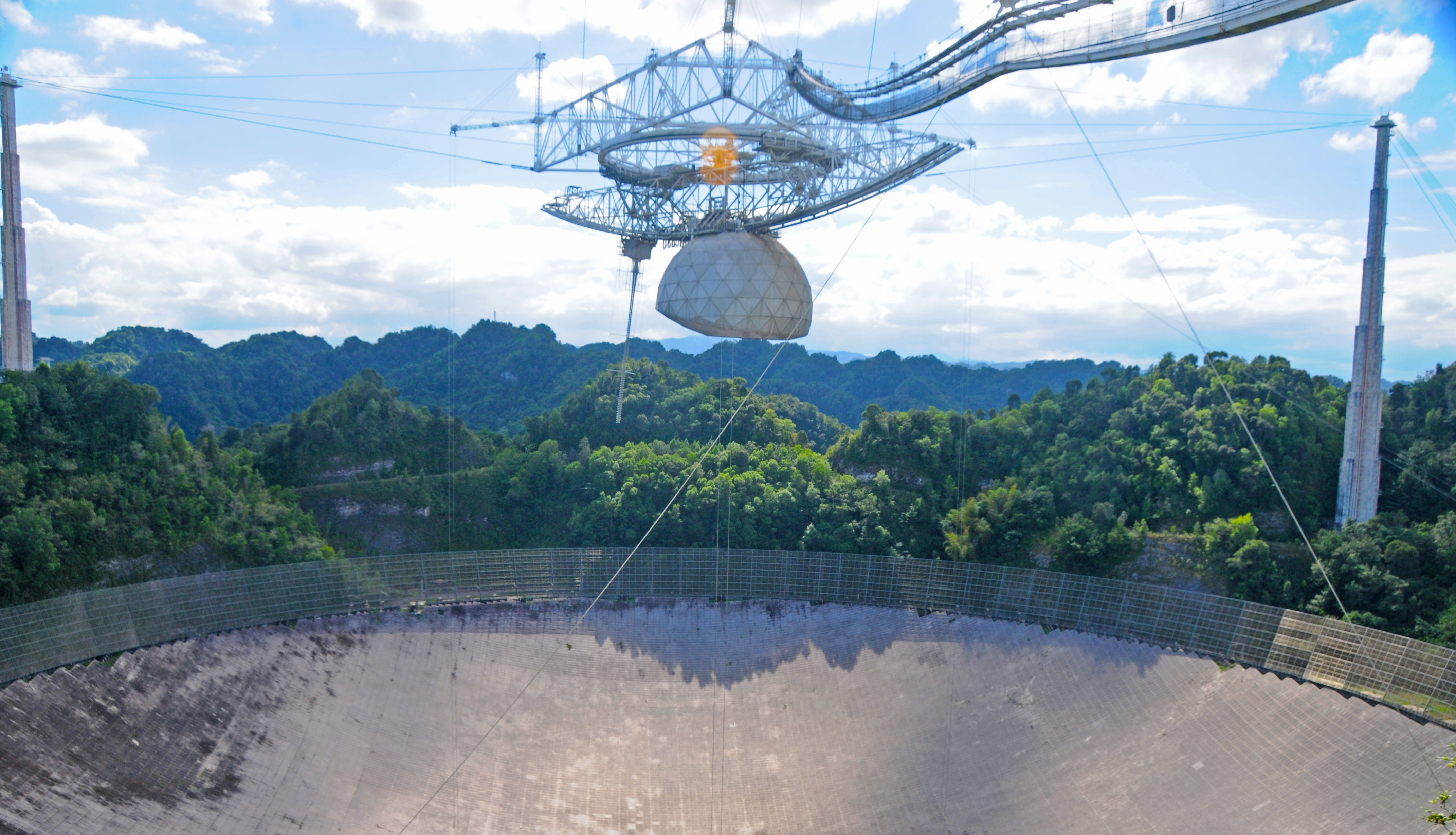 Arecibo radio telescope observatory, Puerto Rico